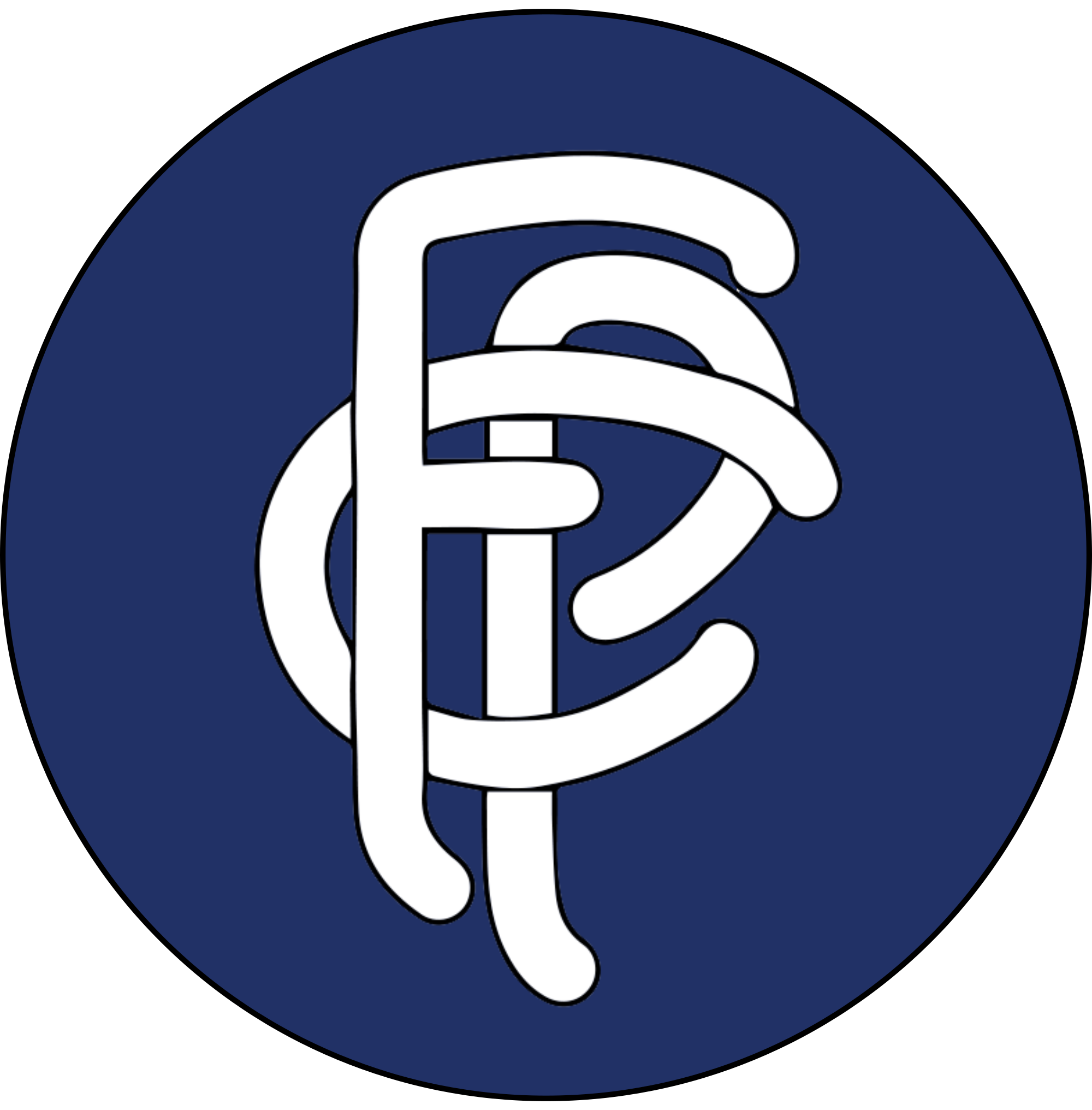 Escudo do "Futebol Clube do Porto", equipe de futebol de Portugal.